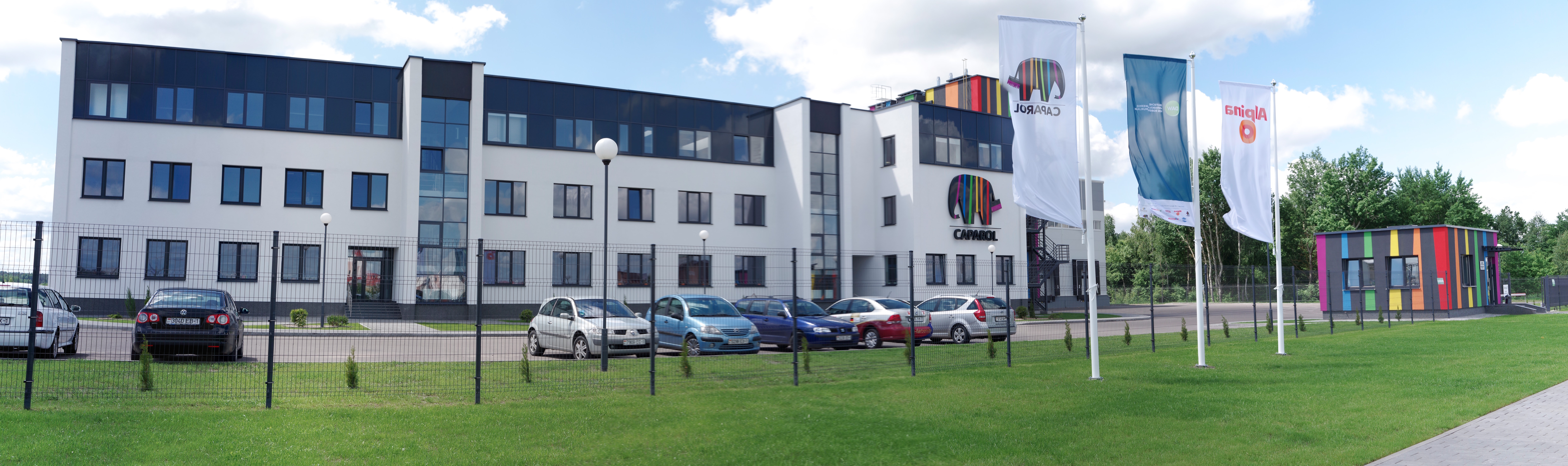 Завод CAPAROL, Брест, Беларусь